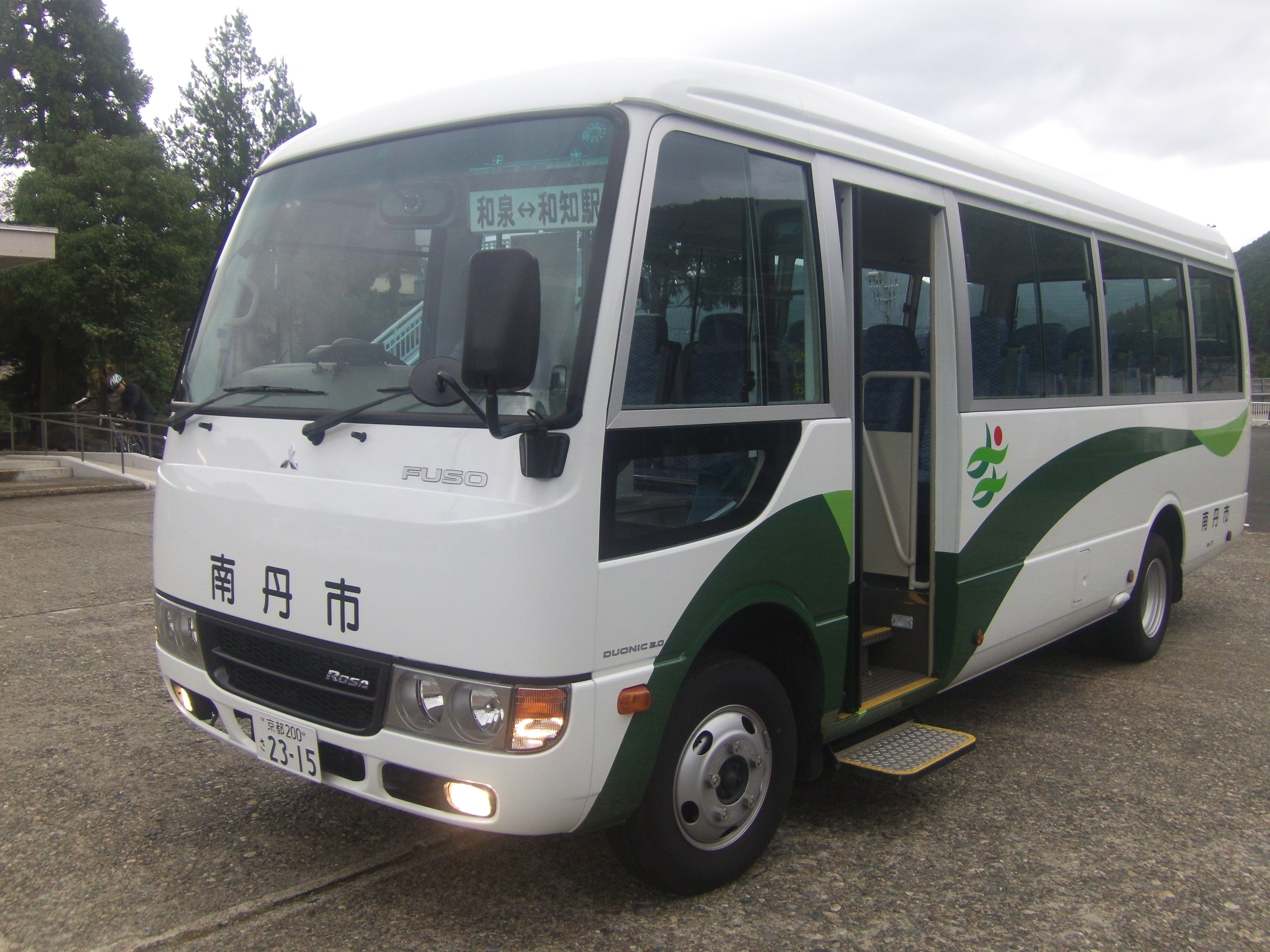 京丹波町の和知駅まで乗り入れている南丹市営バス大野線のマイクロバス